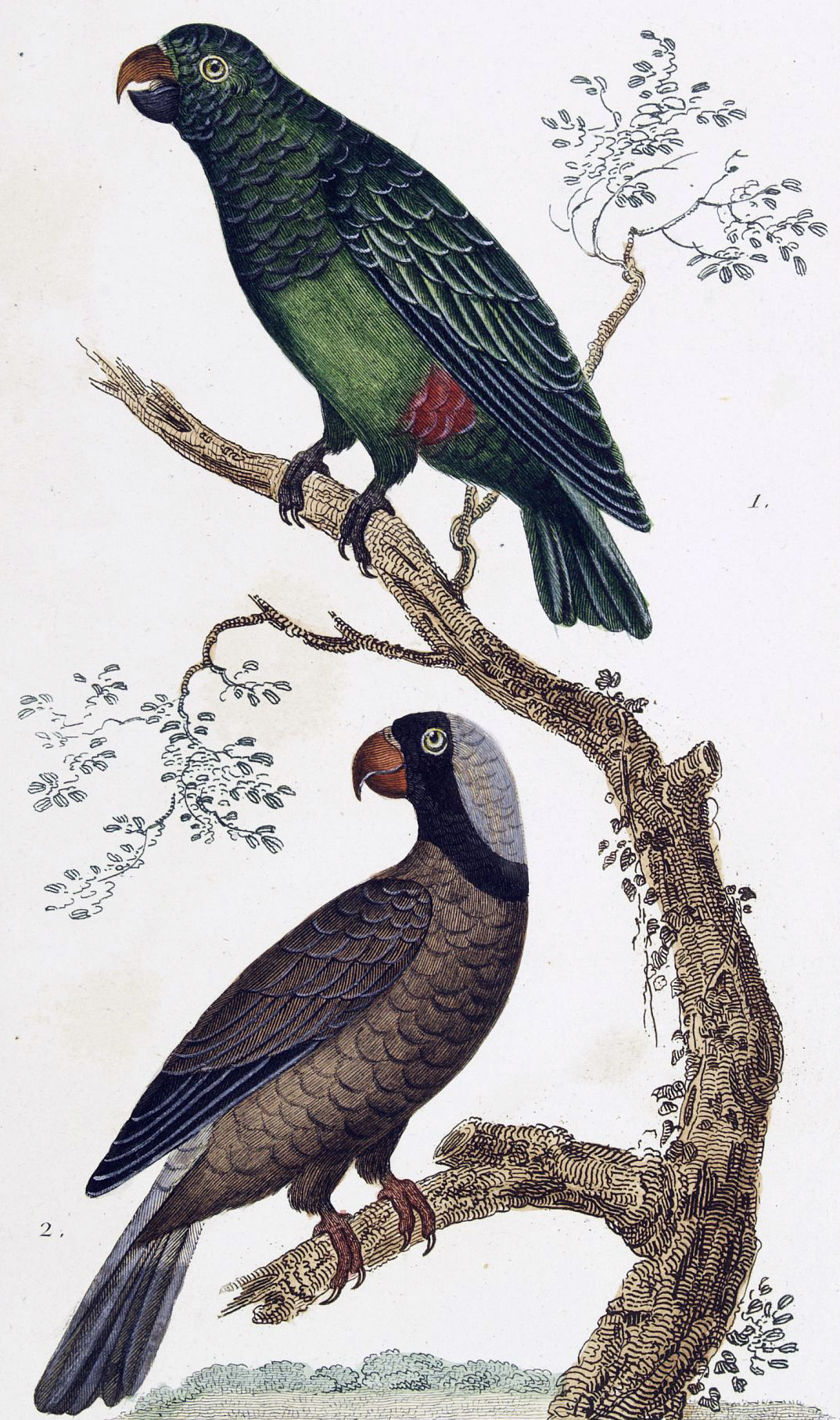 Mascarene Parrot Mascarinus mascarinus and an unidentified green parrot ("le perroquet vert") from L'Histoire Naturelle Des Oiseaux (1850).